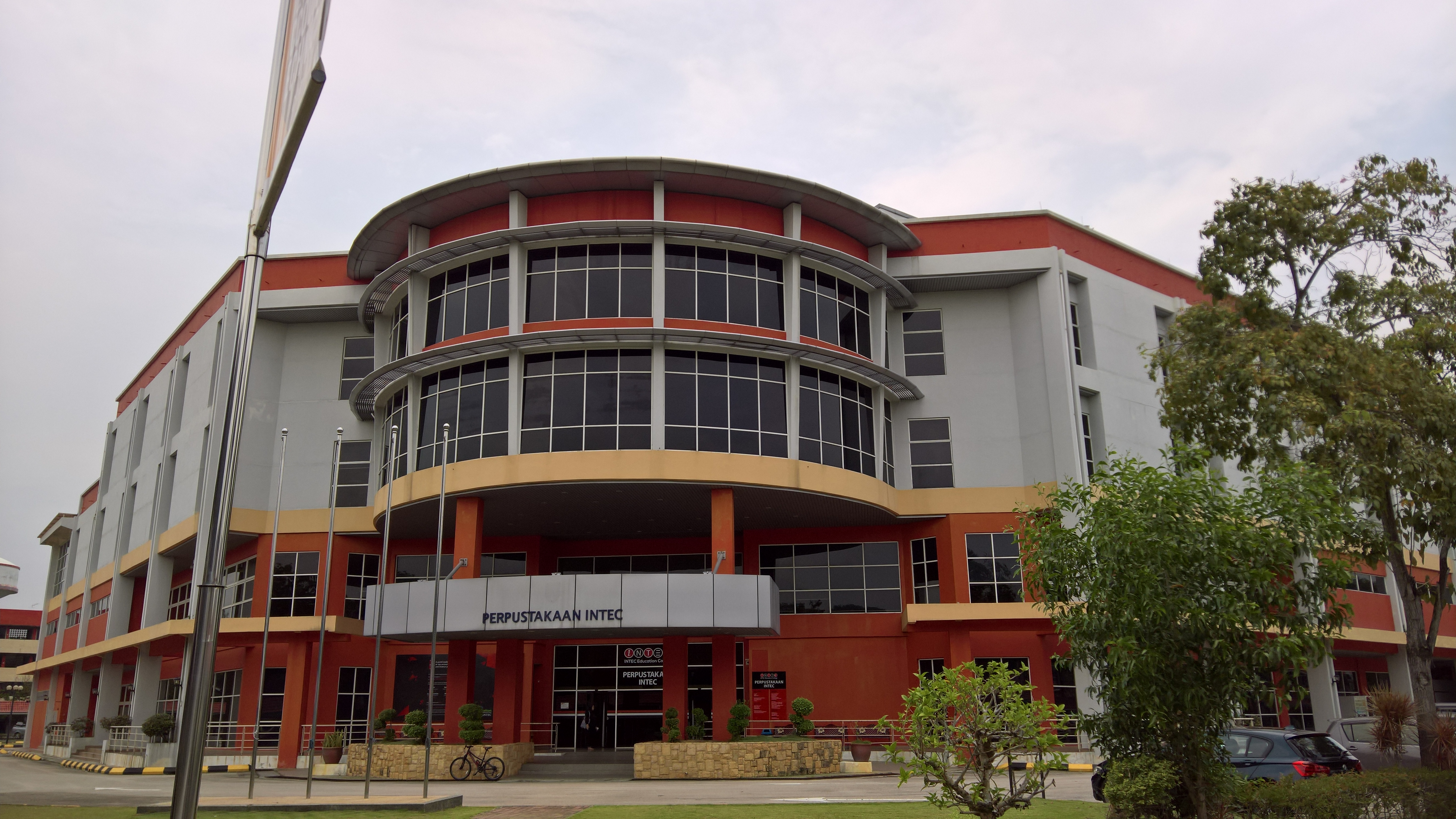 Perpustakaan Intec